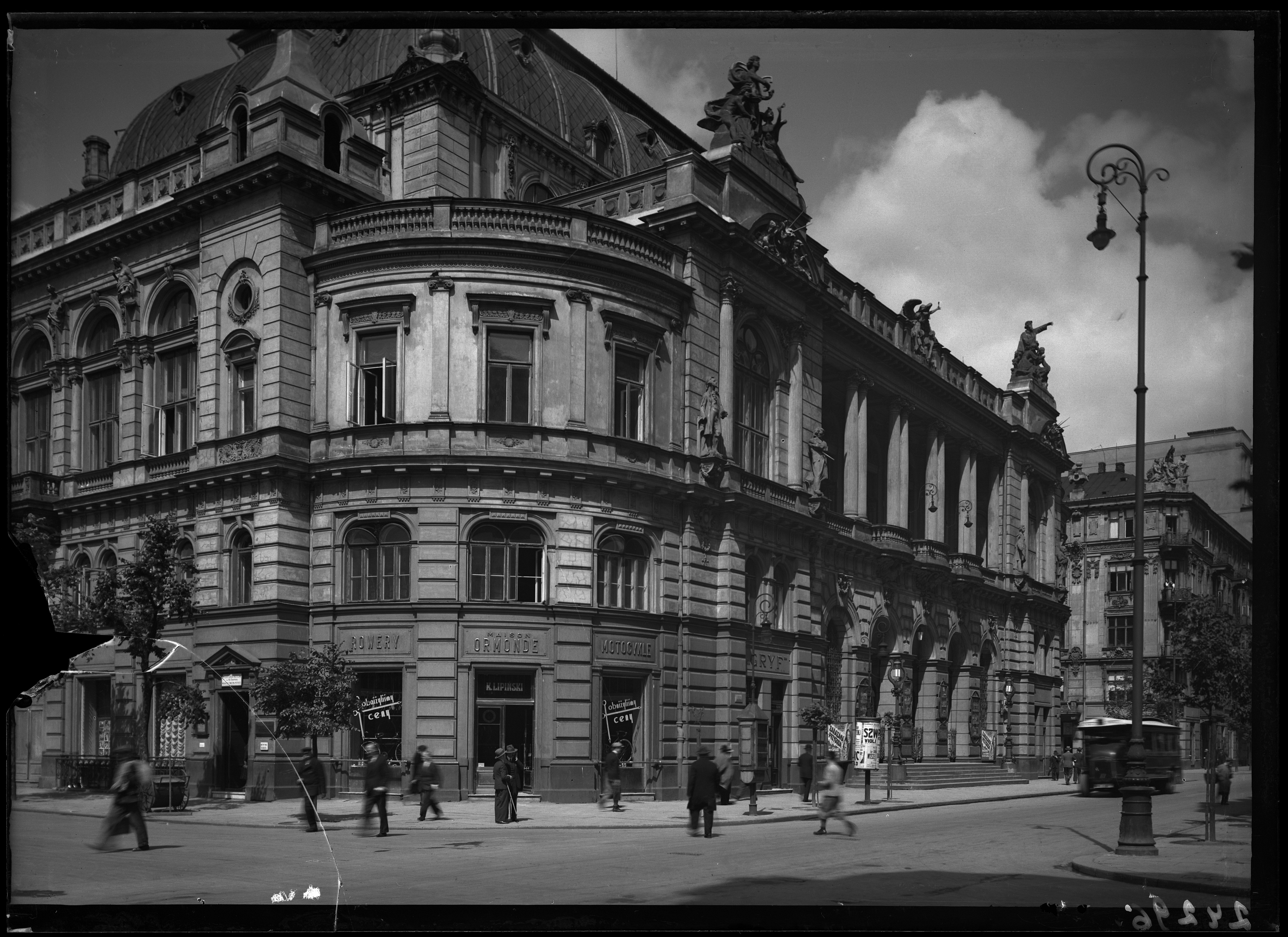 Filharmonia Warszawska, Polska, lata 30.XX w. Fotografia wykonana przez Henryka Poddębskiego w okresie międzywojennym.